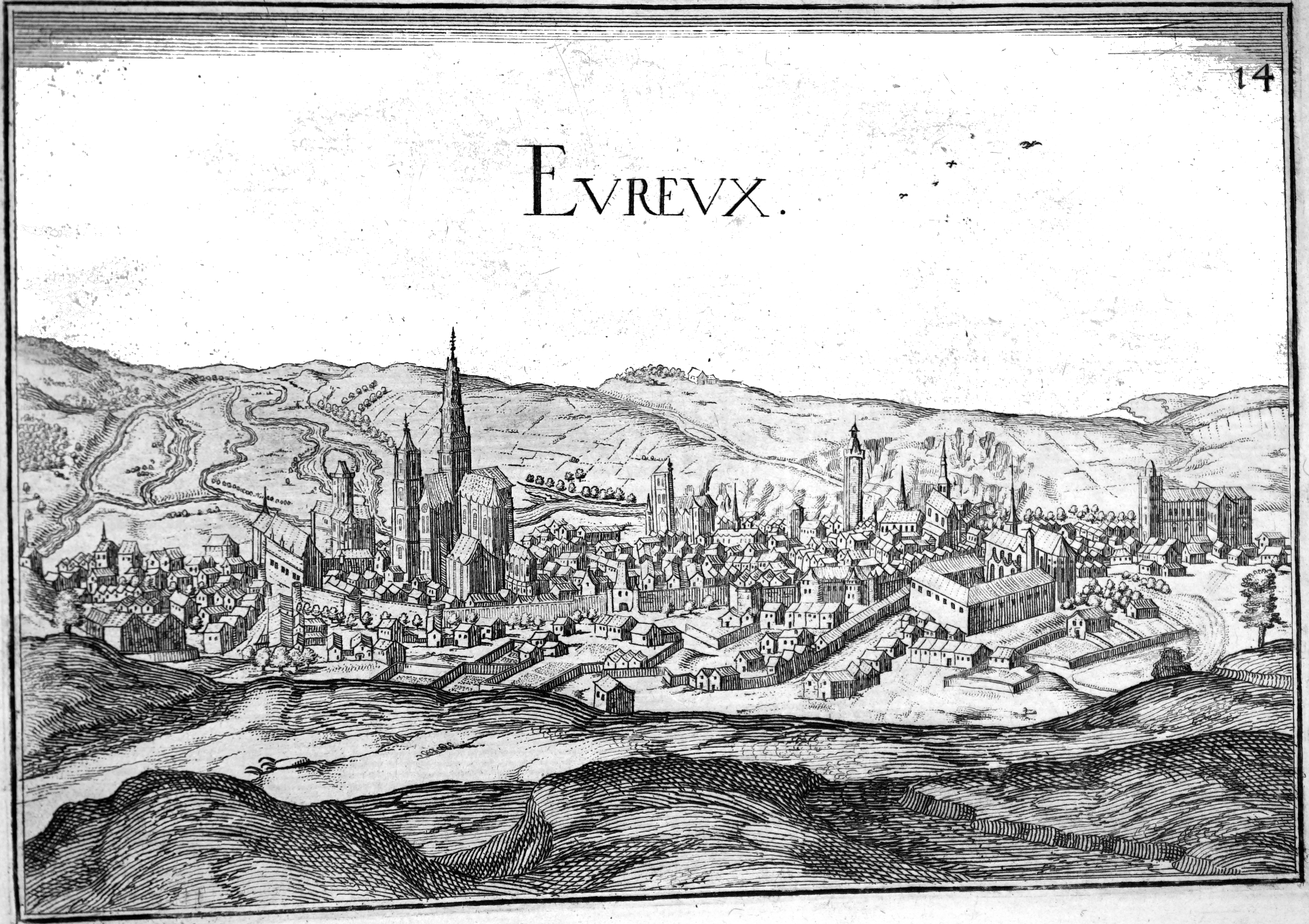 sur un dessin de Tassin dans Plans et profils...'.